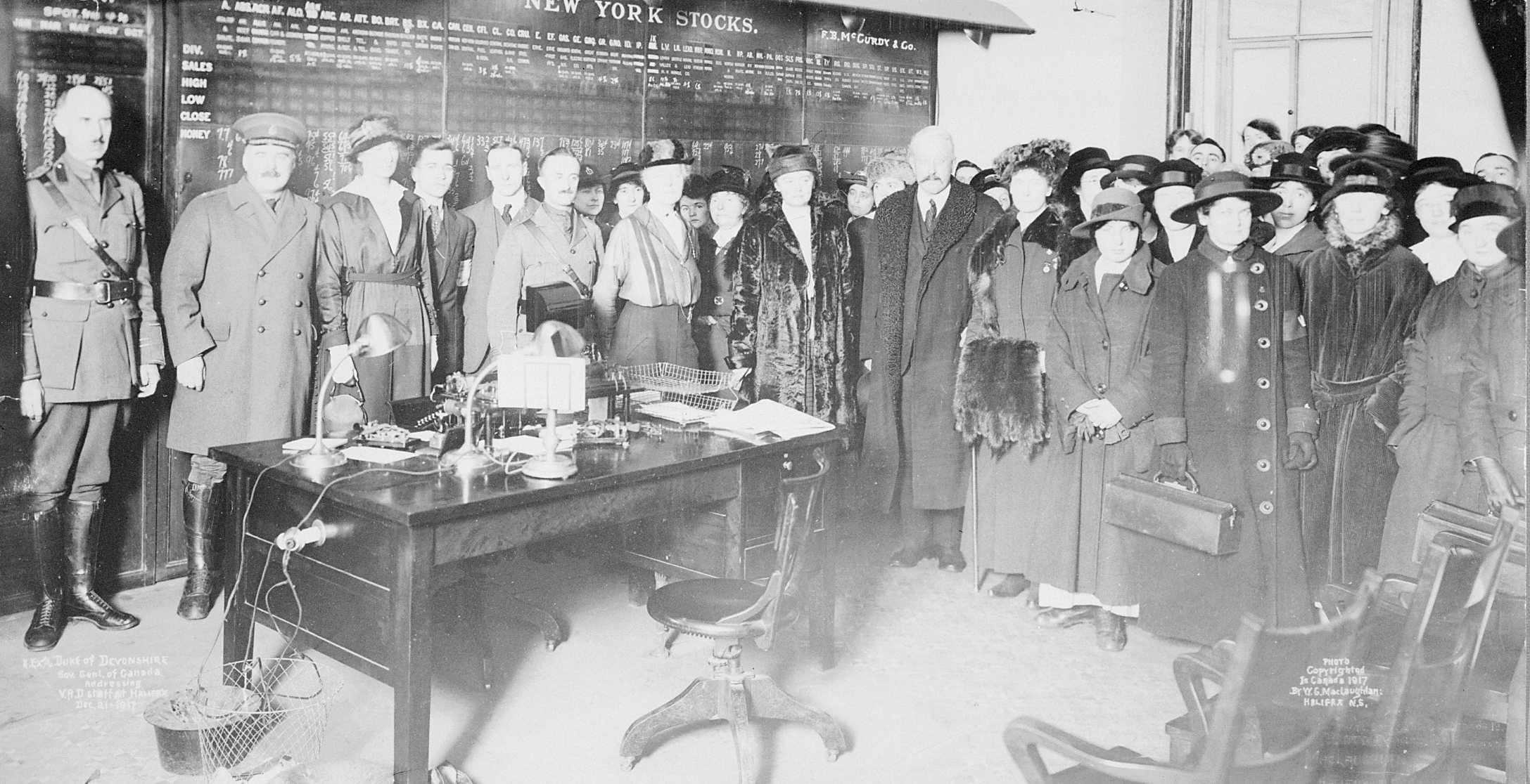 Title / Titre : The Duke of Devonshire, Governor-General of Canada, addressing Voluntary Aid Detachment staff after the Halifax Explosion / Le duc de Devonshire, gouverneur général du Canada, s’adressant au personnel du Détachement d’aide volontaire après l’explosion d’Halifax Creator(s) / Créateur(s) : W. G. McLaughlan Date(s) : December 21, 1917 / 21 décembre 1917 Reference No. / Numéro de référence : MIKAN 3192693, 3623771 Location / Lieu : Halifax, Nova Scotia, Canada / Halifax, Nouvelle-Écosse, Canada Credit / Mention de source : W.G. MacLaughlan. Canada. Canadian Intellectual Property Office. Library and Archives Canada, C-00692 / W.G. MacLaughlan. Canada. l'Office de la propriété intellectuelle du Canada. Bibliothèque et Archives Canada, C-006927